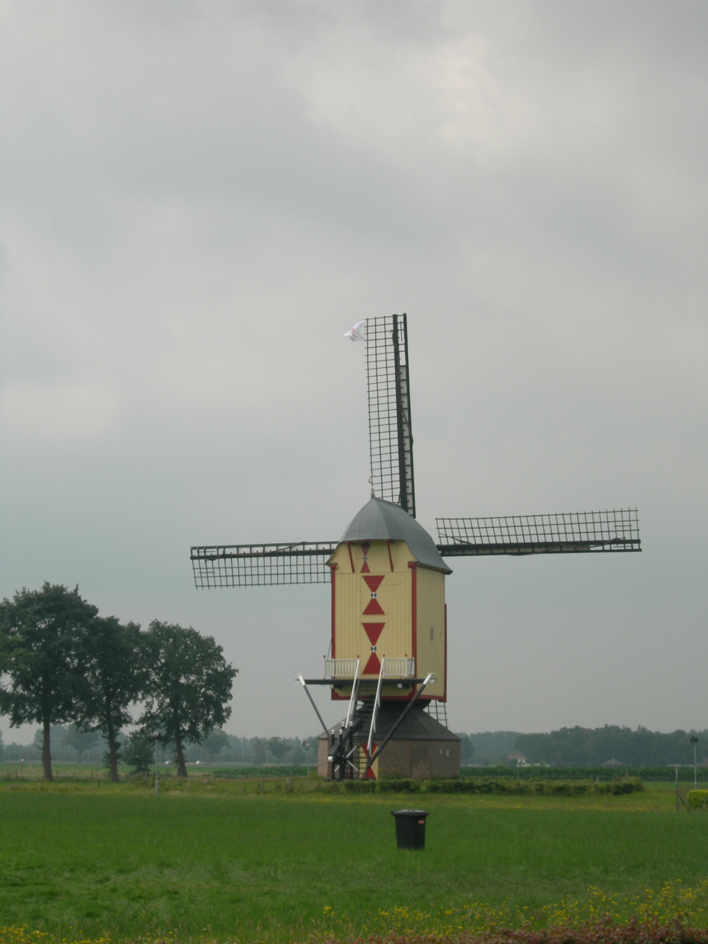 Geffen, North Brabant, molen de Vlijt